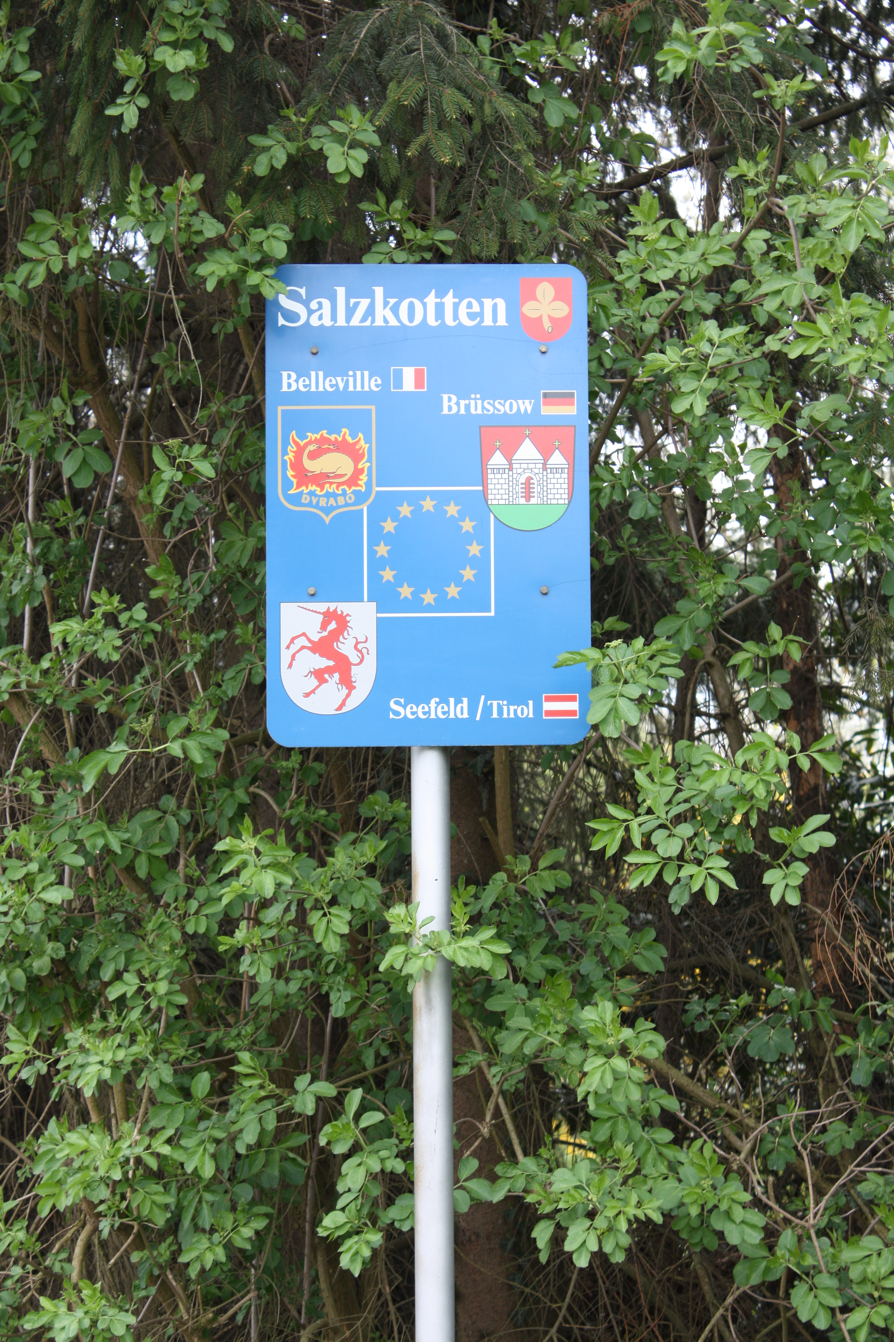 Straßenschild Städtepartnerschaften Salzkotten